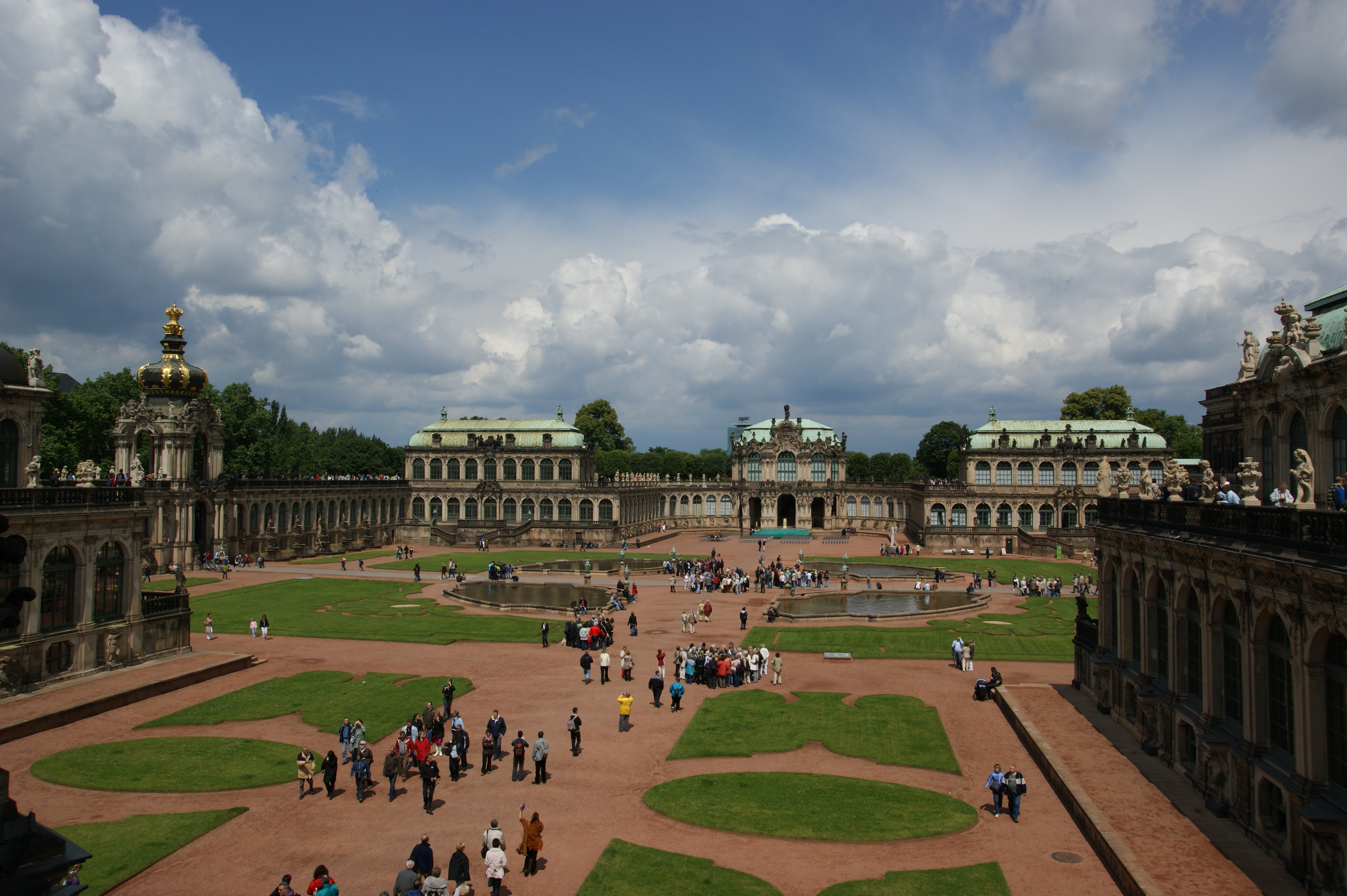 Dresdner Zwinger